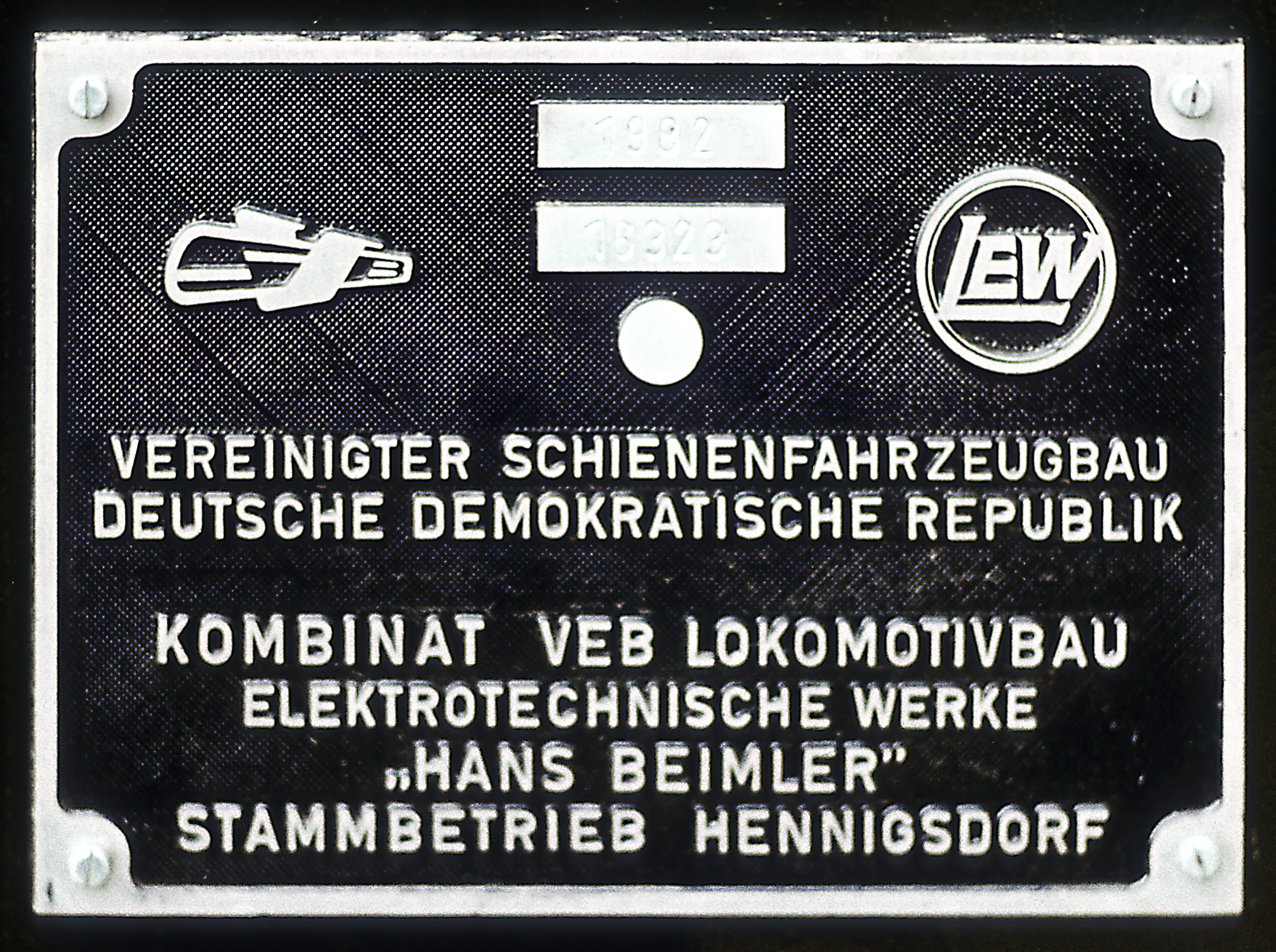 Prototyp der BR 212/243, GussschildLeipziger Frühjahrsmesse 1982